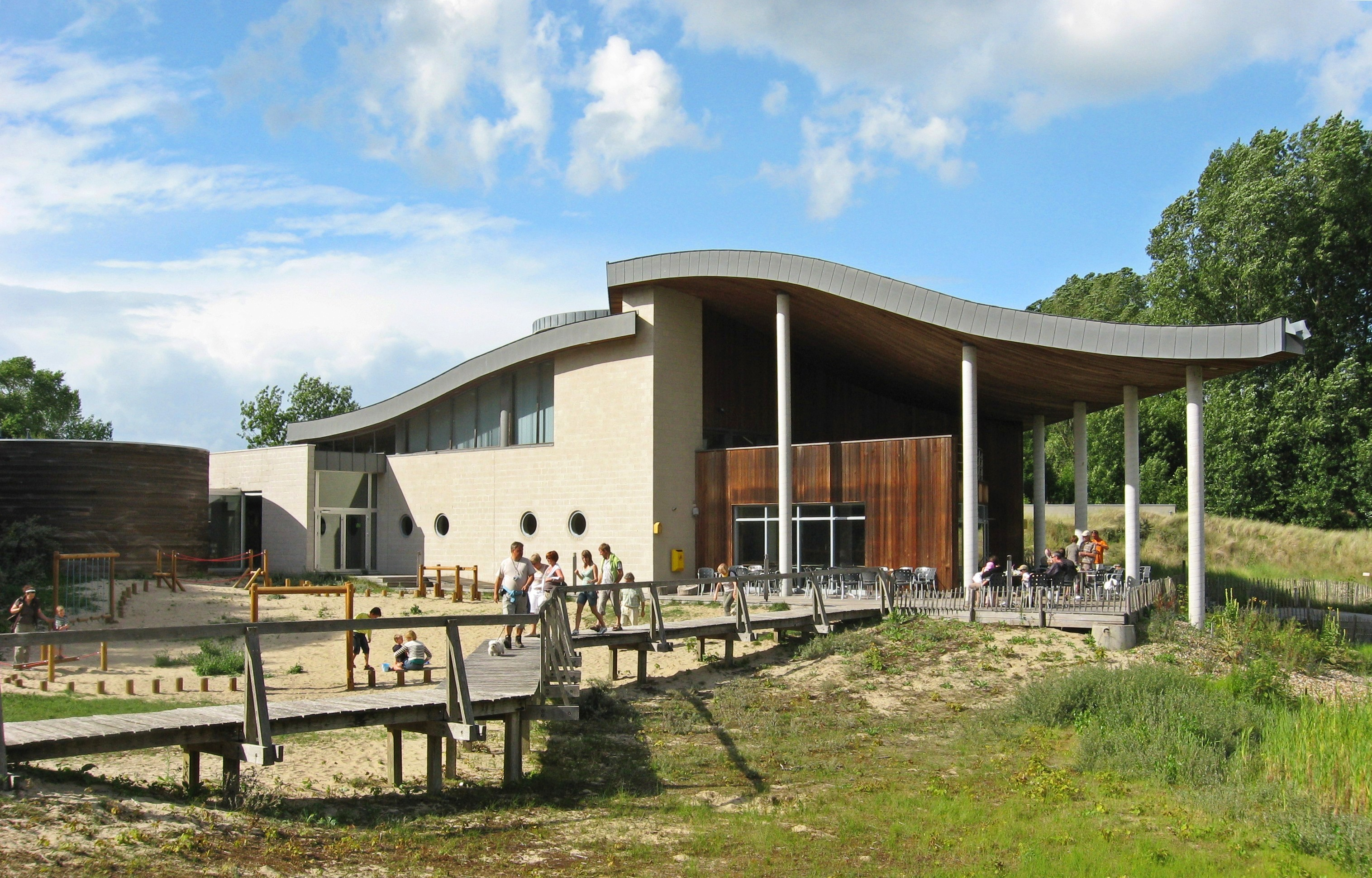 Rückseite des Naturparkzentrums De Nachtegaal (Die Nachtigall) in einem Museum von De Panne